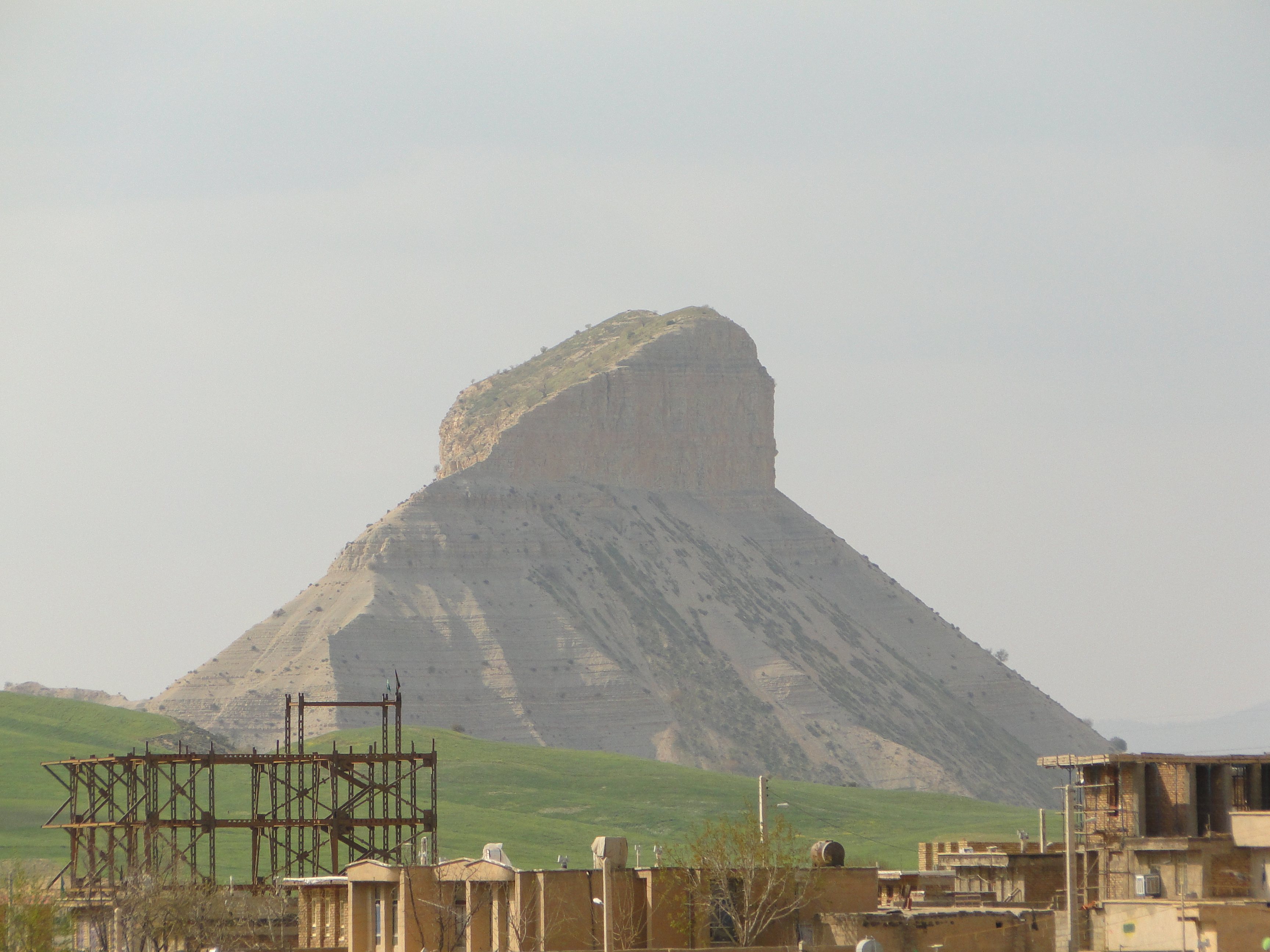 نمایی از قلاقیران - هفت چشمه